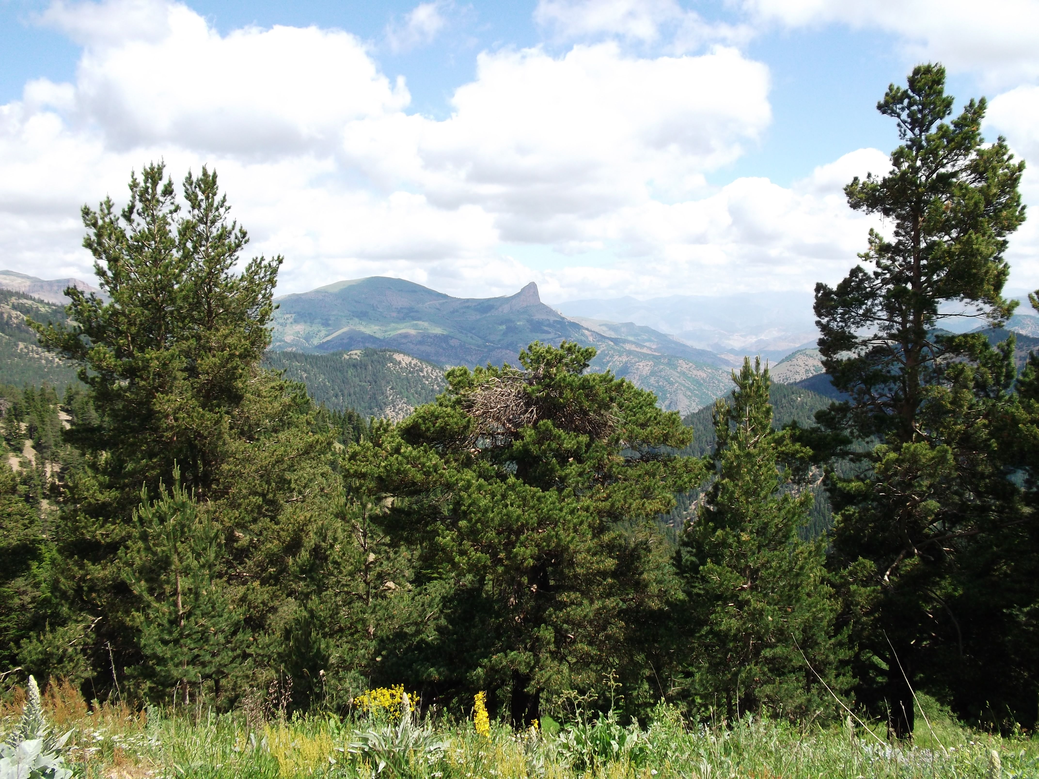 Gümüşhane Dağları...